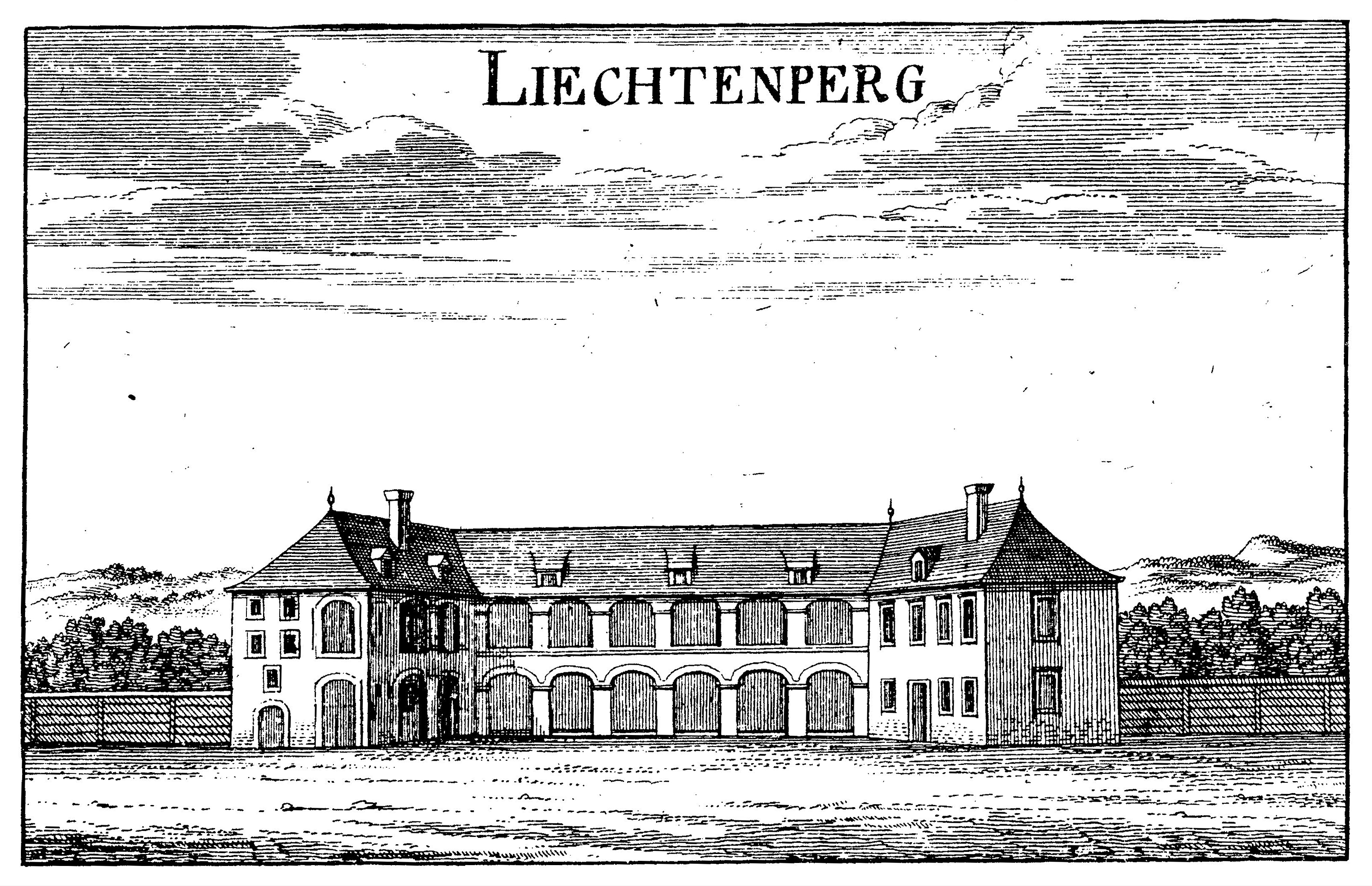 Schloss Liechtenperg (Lichtenhof) bei Stainz, Weststeiermark, Österreich: Abbildung (Blick Richtung Westen) aus: Georg Matthäus Vischer: Topographia Ducatus Stiriae, 1681. Kopie aus: Werner Murgg, Bernhard Hebert: Mittelalterliche und Frühneuzeitliche Wehrbauten im Bezirk Deutschlandsberg: Aufnahme der Bodendenkmale. Mit Zeichnungen von Stefan Karl. Beiträge zur Mittelalterarchäologie in Österreich BMÖ. Band 10, Jahrgang 1994. Hrsg: Österreichische Gesellschaft für Mittelalterarchäologie ÖGM, Wien. ISSN 1011-0062. S. 95.